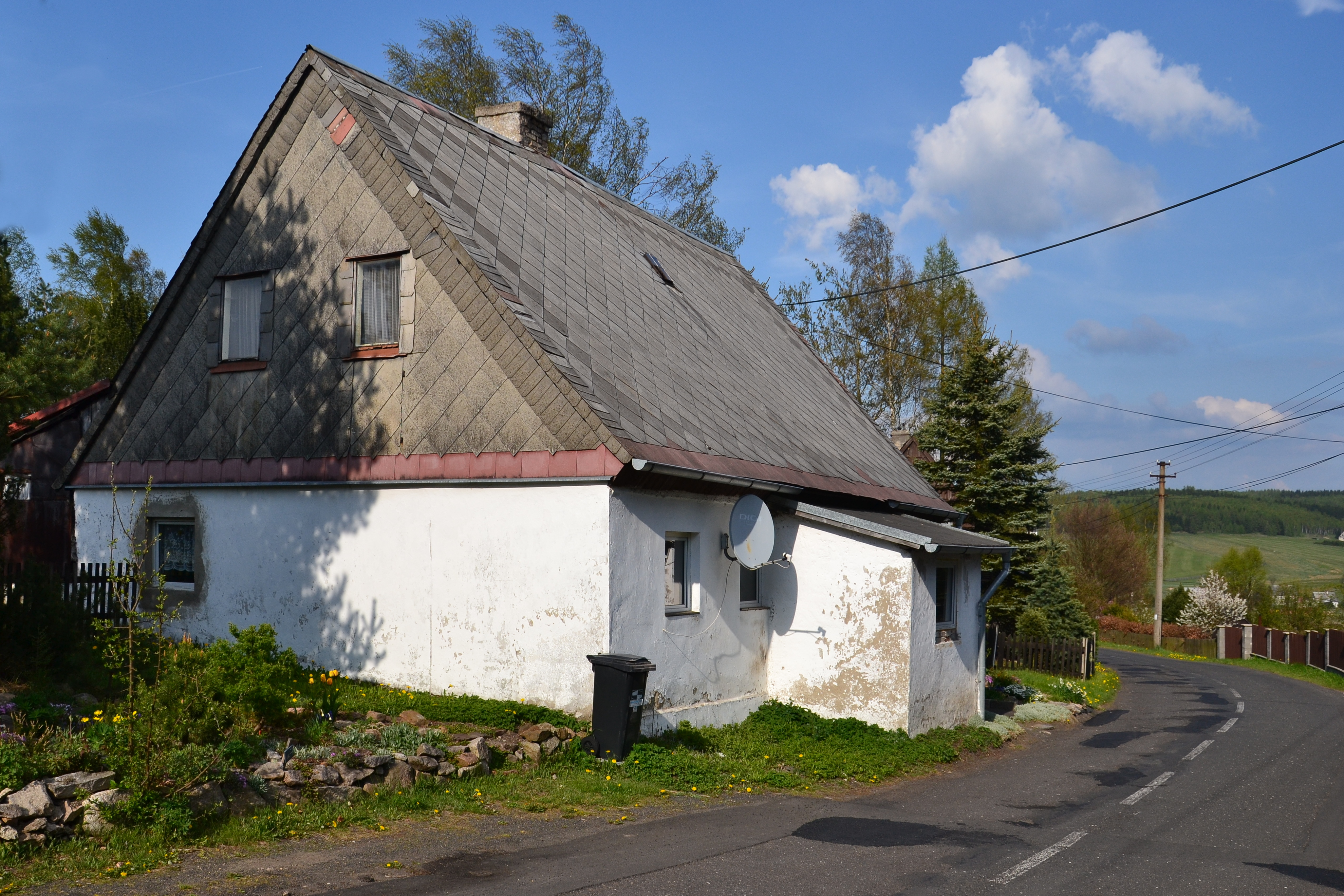 Dům čp. 34, Kalek čp. 34, Kalek.